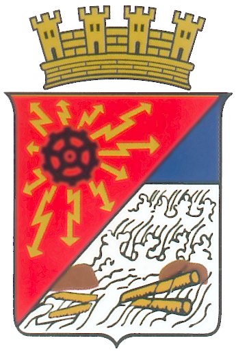 Hønefoss gamle byvåpen ble opprettet ved kgl. resolusjon av 15. mars 1902. Det var tegnet av myntgravør Ivar Throndsen (1853-1932) og har et motiv som henspeiler på byens bakgrunn og opprinnelse. Da den gamle bykommunen Hønefoss ved årsskiftet 1963/1964 inngikk i den nye storkommunen Ringerike, var det alt besluttet å la gamle og ærverdige Hønefoss Sparebank få beytte det gamle byvåpnet. Det gjør banken fortsatt, men med visse endringer (tillegg).